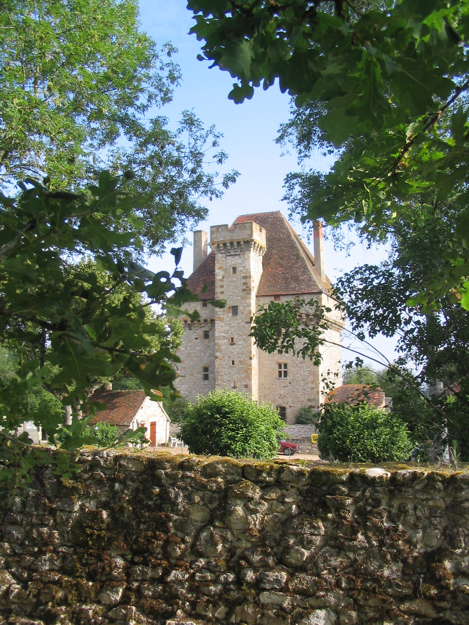 Château de la Souche, situé à Doyet (Allier, 03), inscrit sur la liste des Monuments Historiques de France, depuis le 30 septembre 1991 (PA00093087).